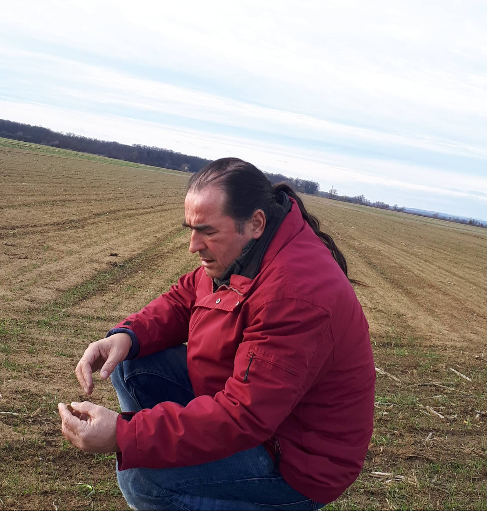 Branko Kerman